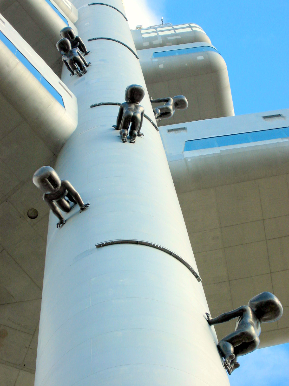 Praha, Žižkovský vysílač, detail